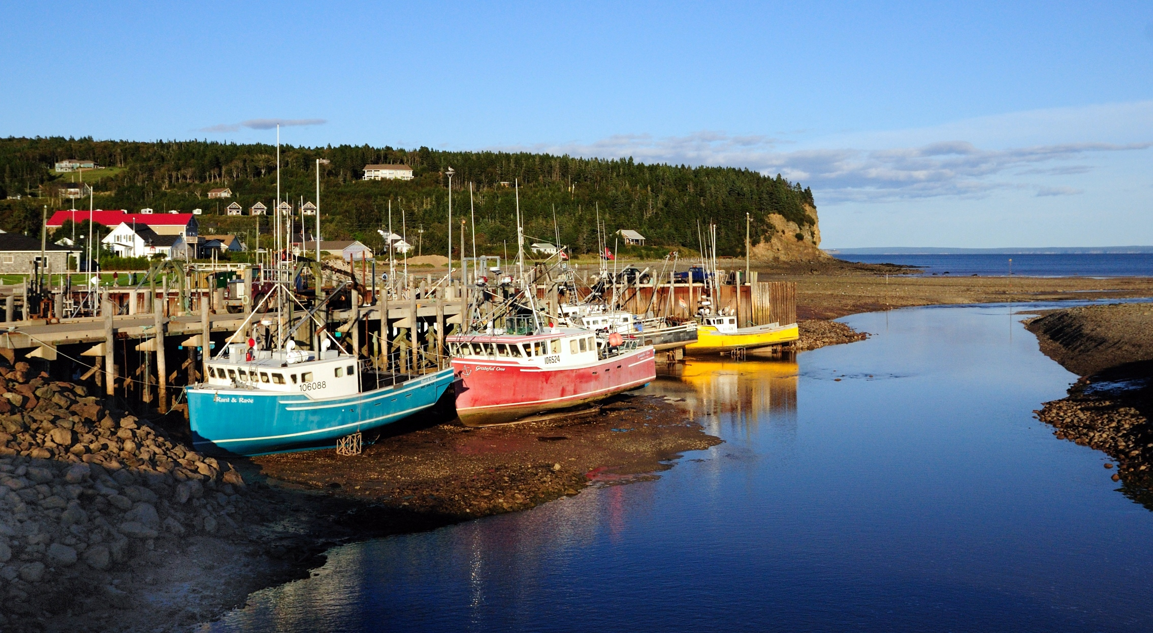 Alma (New Brunswick) bei Ebbe